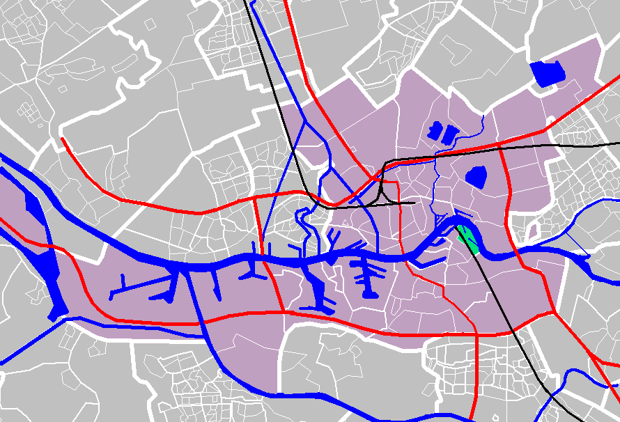 Rotterdam districts/neighboorhoods